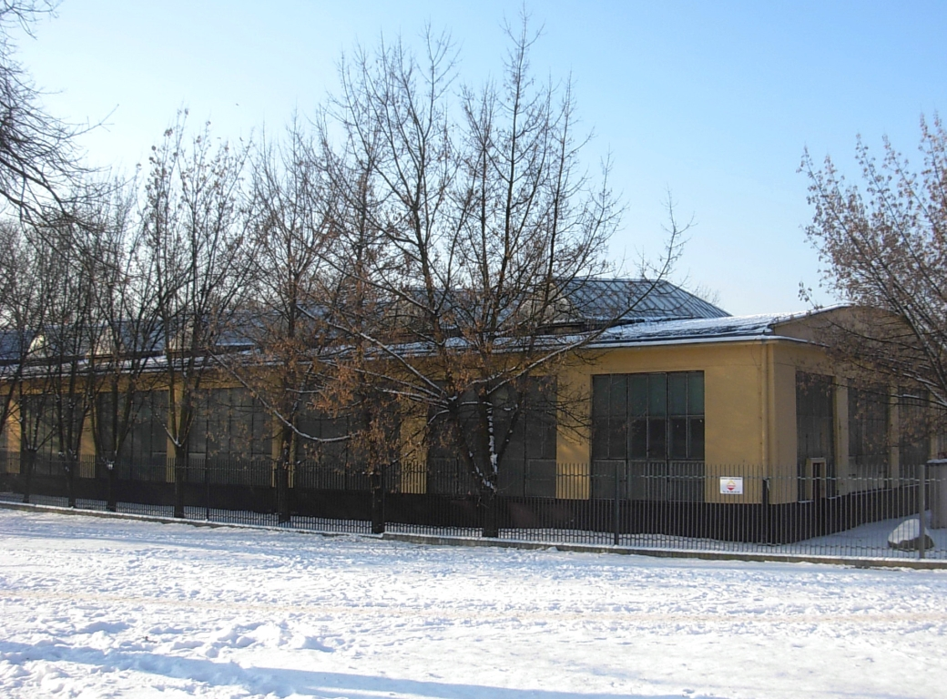 Fragment hali Pasamonu na os. Skrzetusko w Bydgoszczy